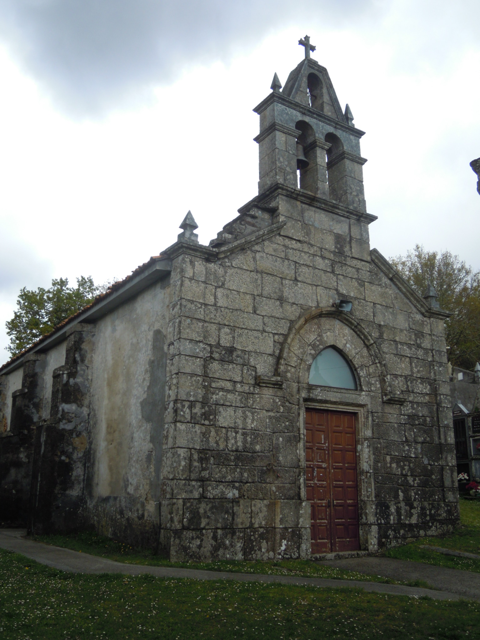 Igrexa parroquial de Baíste (Avión).